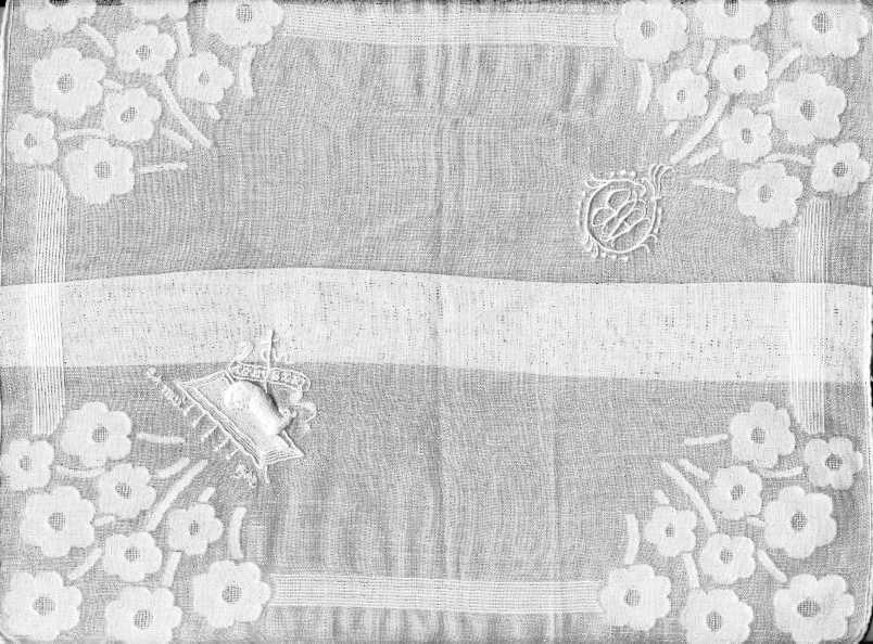 Taschentuch für Erstkommunion, mit Lamm, Musée de Fontenoy